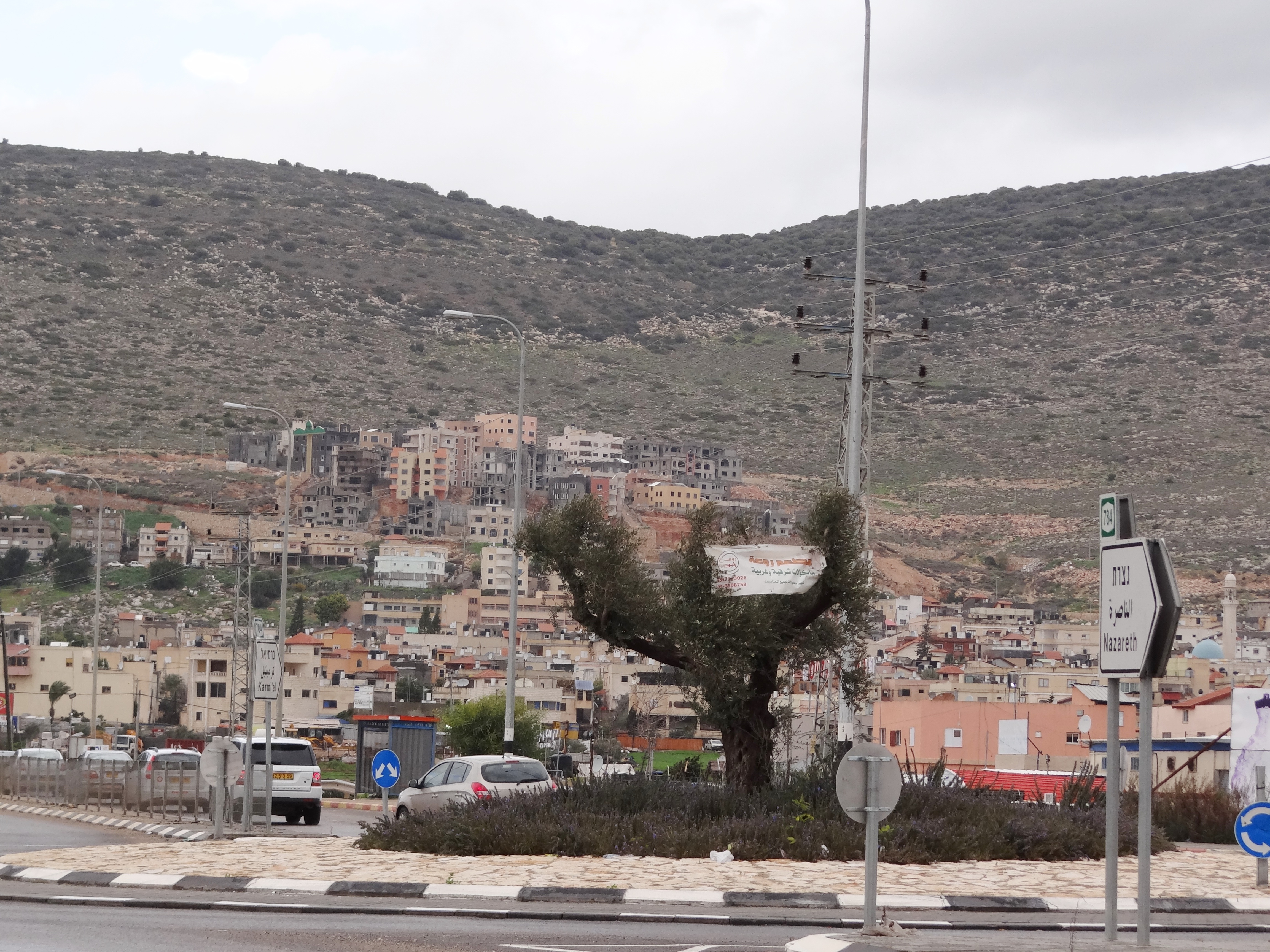 Kafr Manda is an Israeli-Arab town in the Lower Galilee כפר מנדא הוא מועצה מקומית במחוז הצפון בישראל, בשולי בקעת בית נטופה